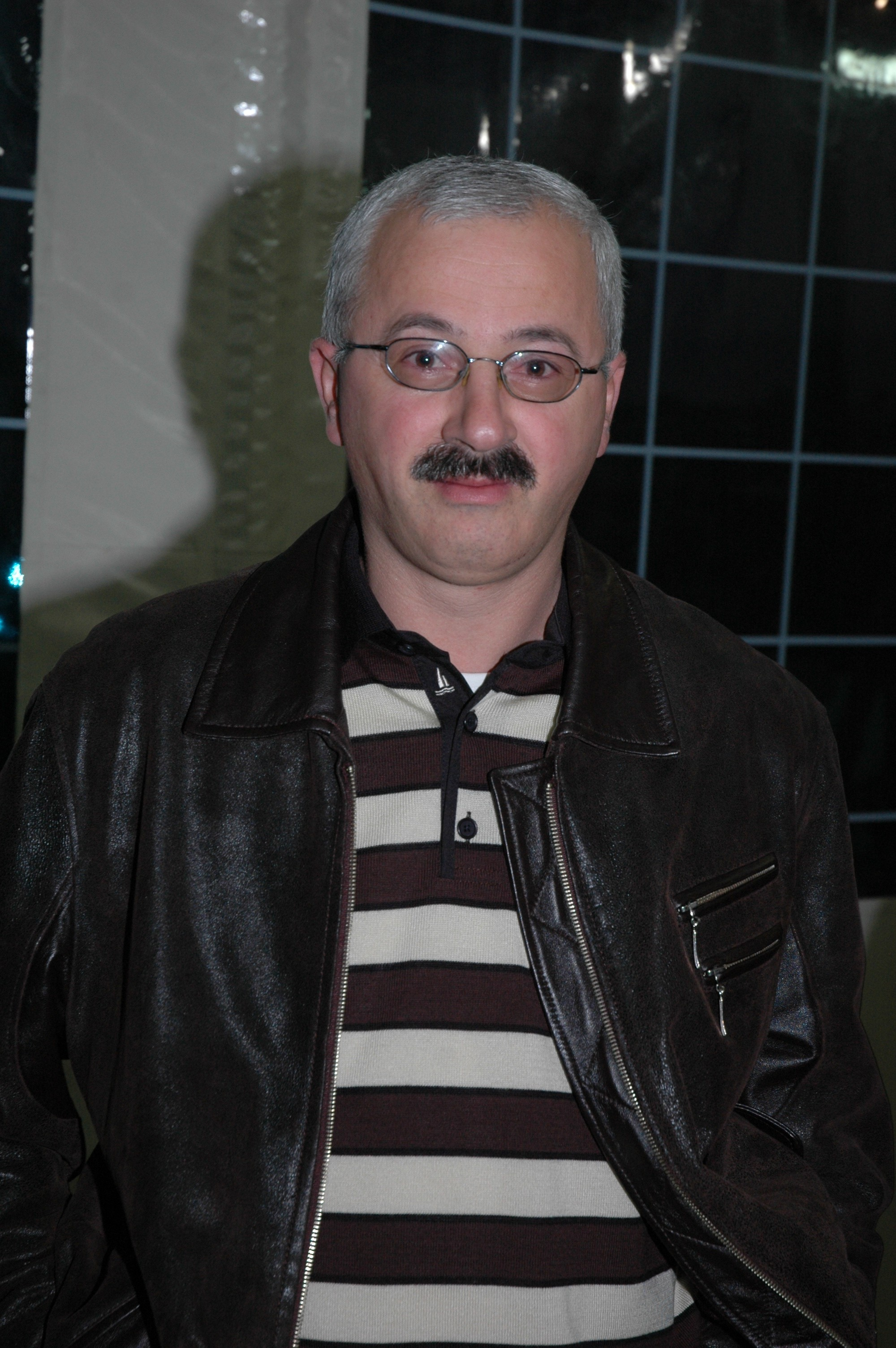 תאופיק מנסור